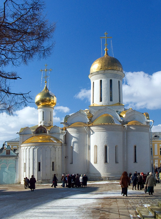 Собор Троицы Живоначальной (Москва и Московская область, Сергиев Посад, Троице-Сергиева Лавра)